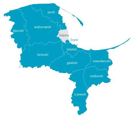 Mapa powiatów-członków GOM